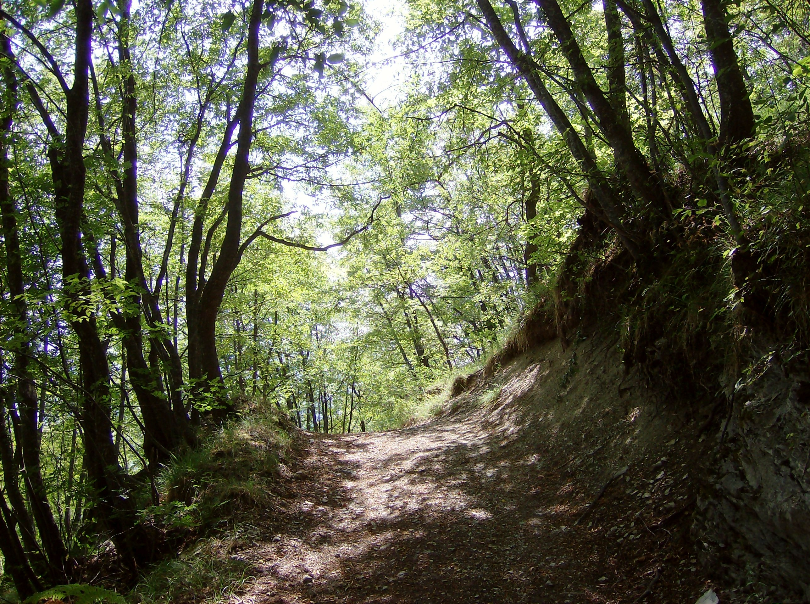 Passeggiando tra i Boschi di forca di valle